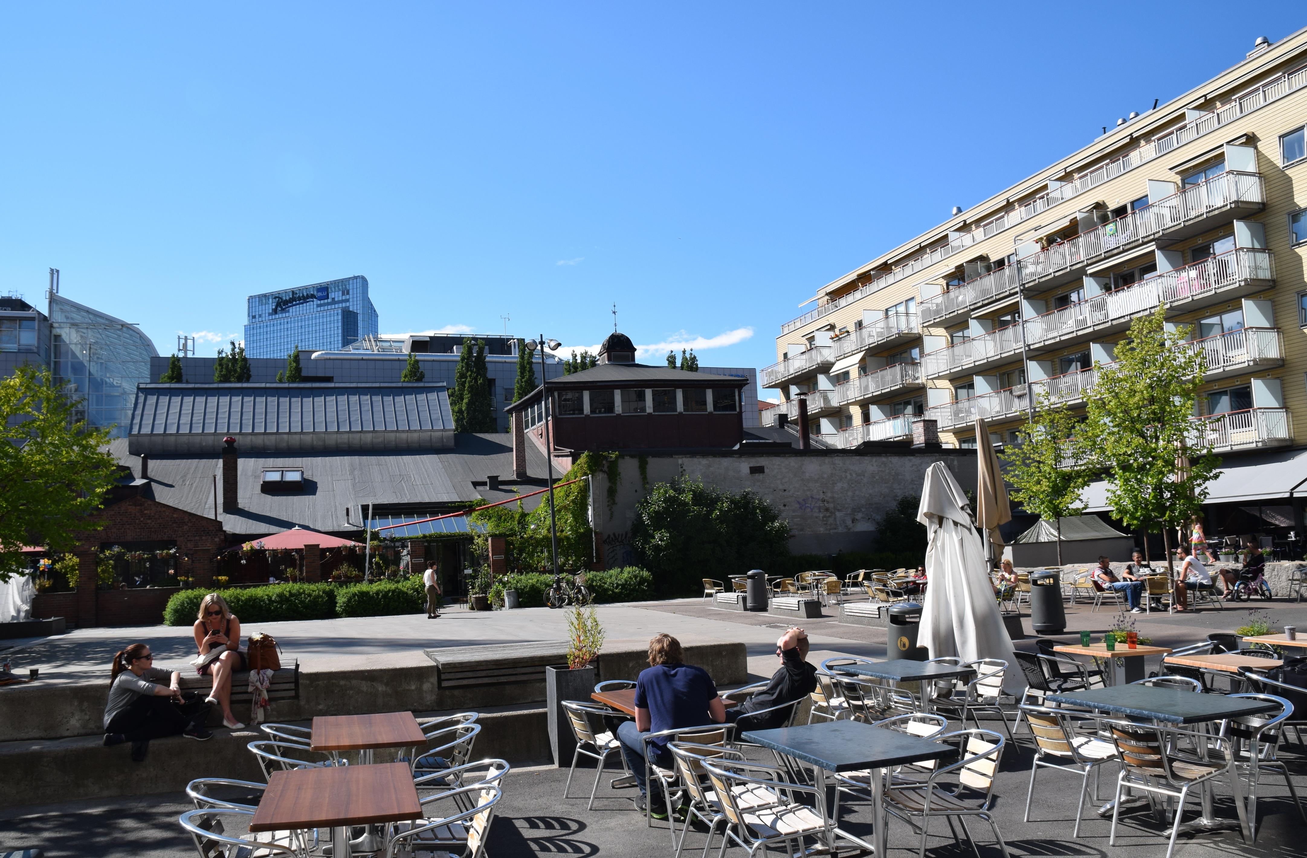 Teaterplassen, Grønland, Oslo seen from Mandalls gate, With Dramatikkens hus (brick building)